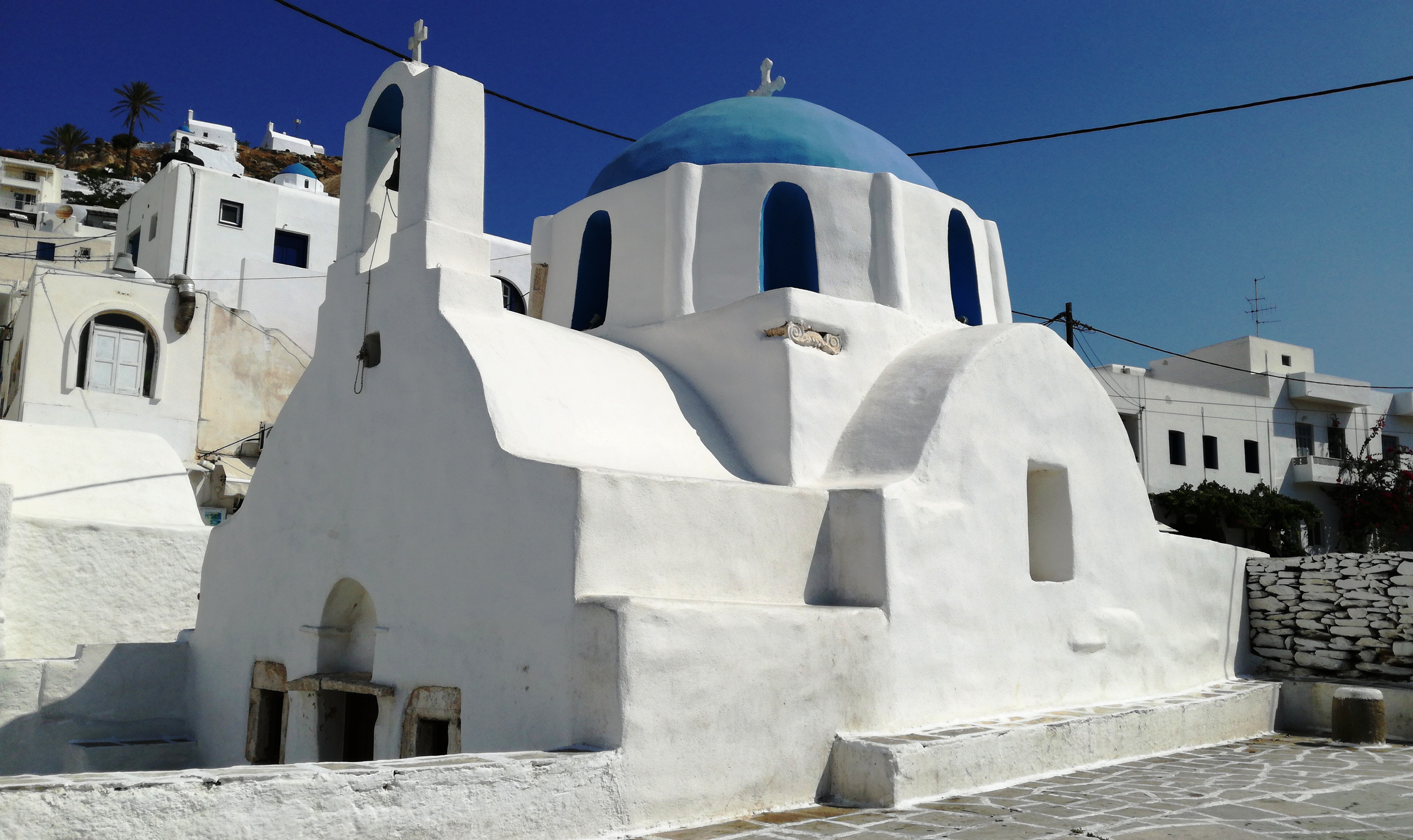 Χώρα Ίου«Χώρα Ίου»